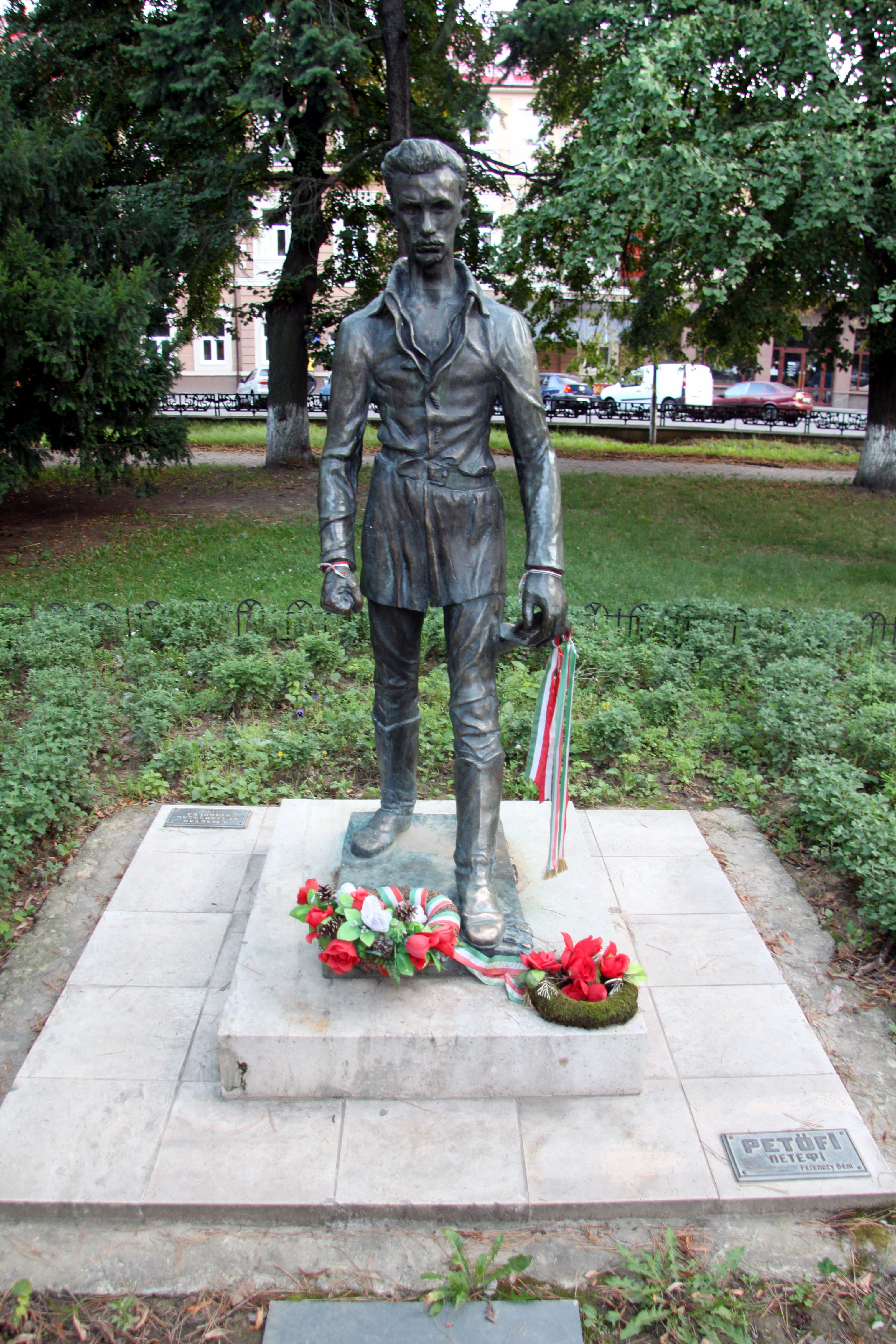 Пам'ятник угорському поету Ш.Петефі, пл. Петефі, Ужгород